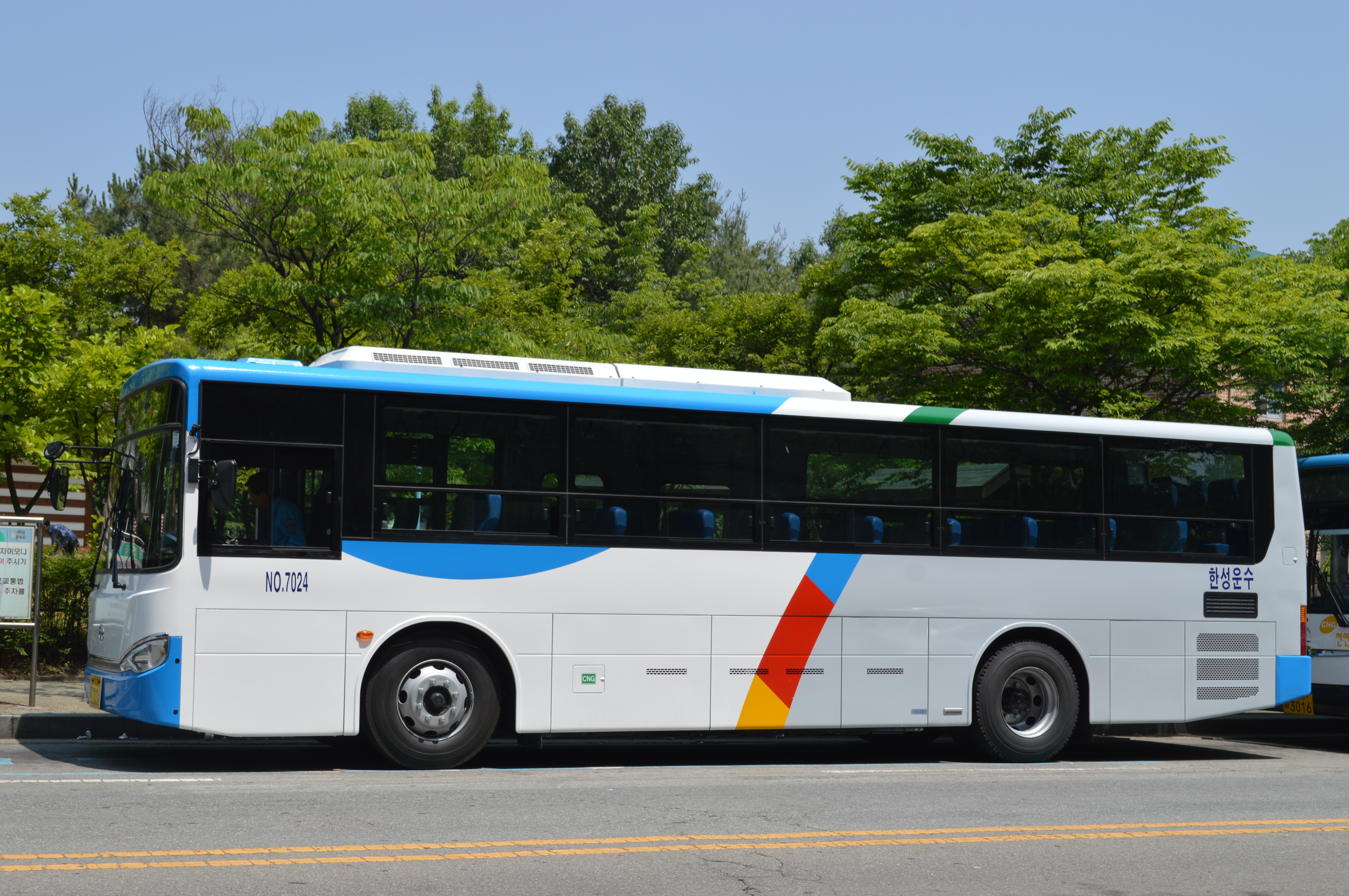 청주 한성운수 소속 NEW BS106